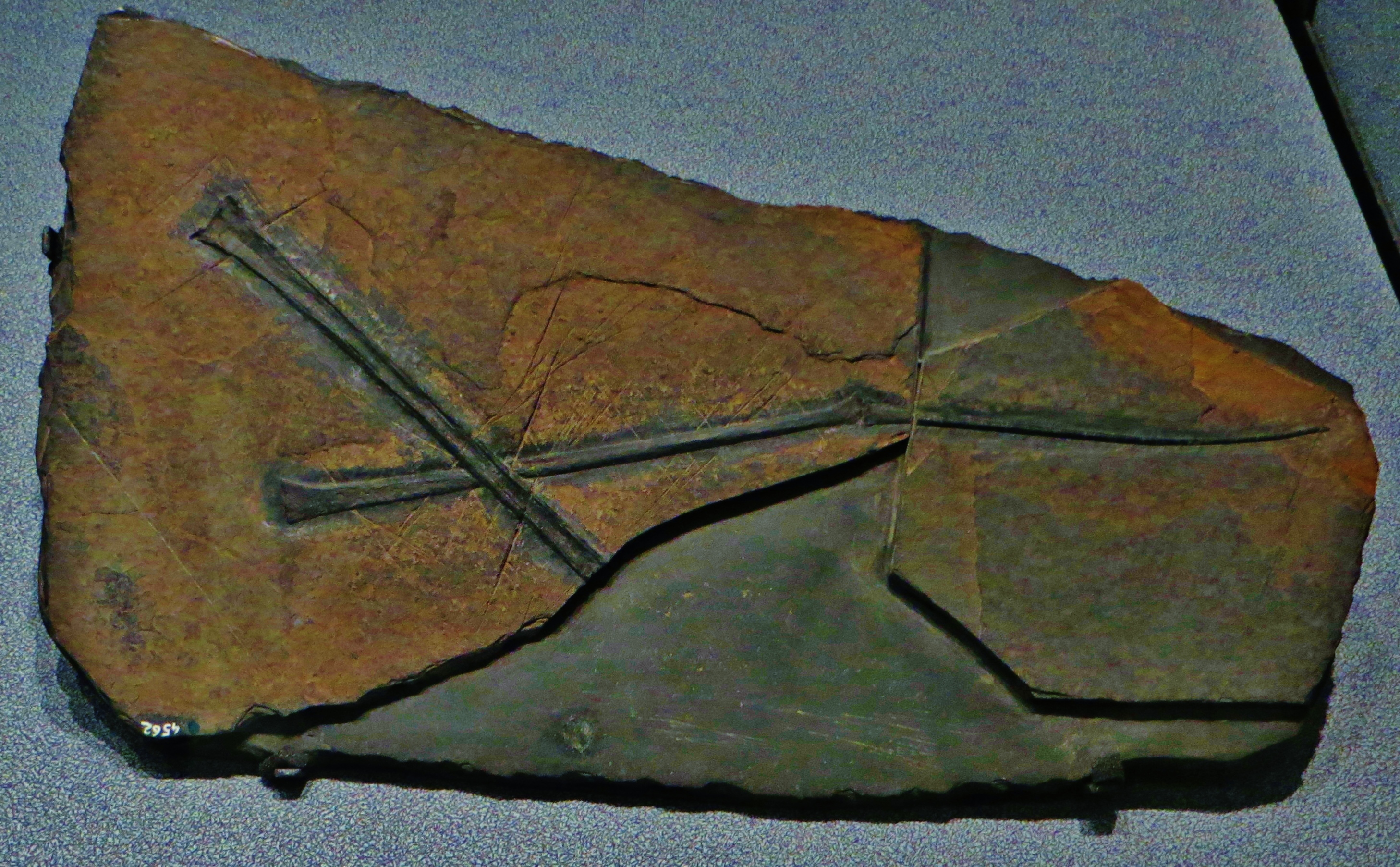 Fossil of Preondactylus, an extinct reptile- Took the picture at Museo di Scienze Naturali, Bergamo